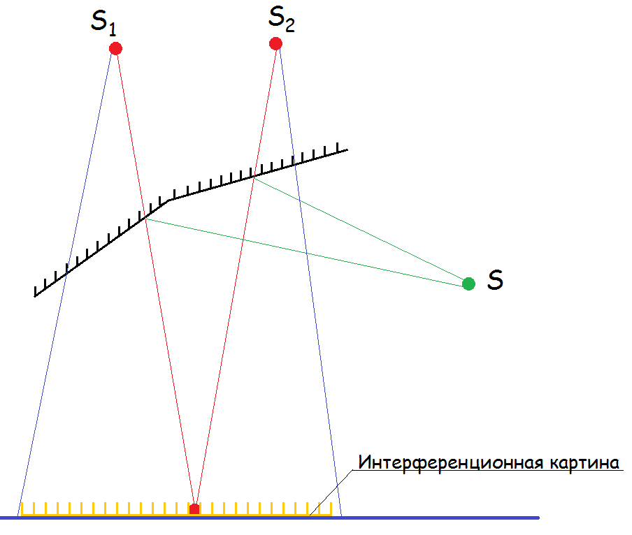 Бизеркала Френеля